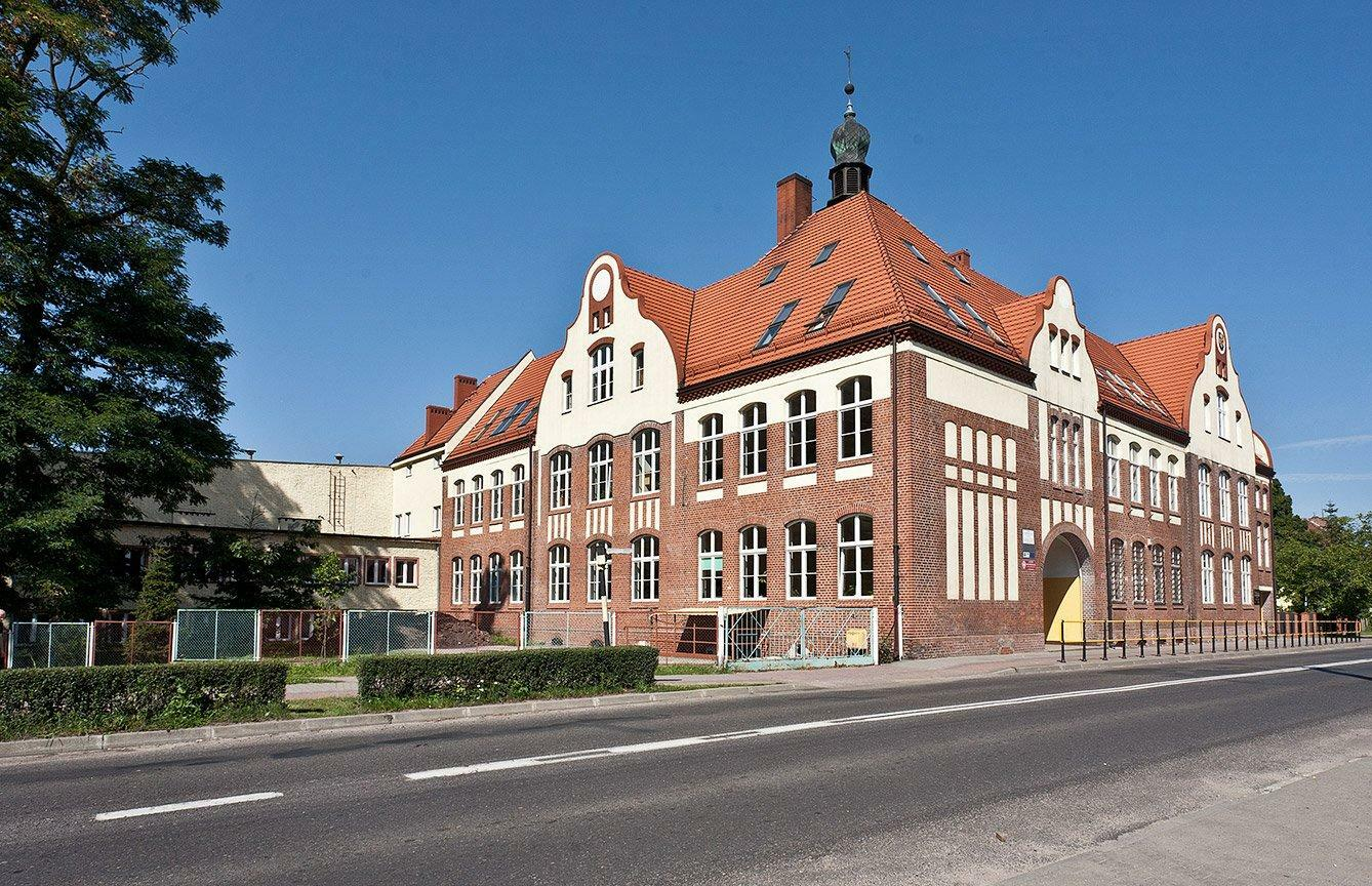 Obiekt wzniesiony w 1910 r. jako budynek szkolny. Wyremontowany w pocz. XXI w.